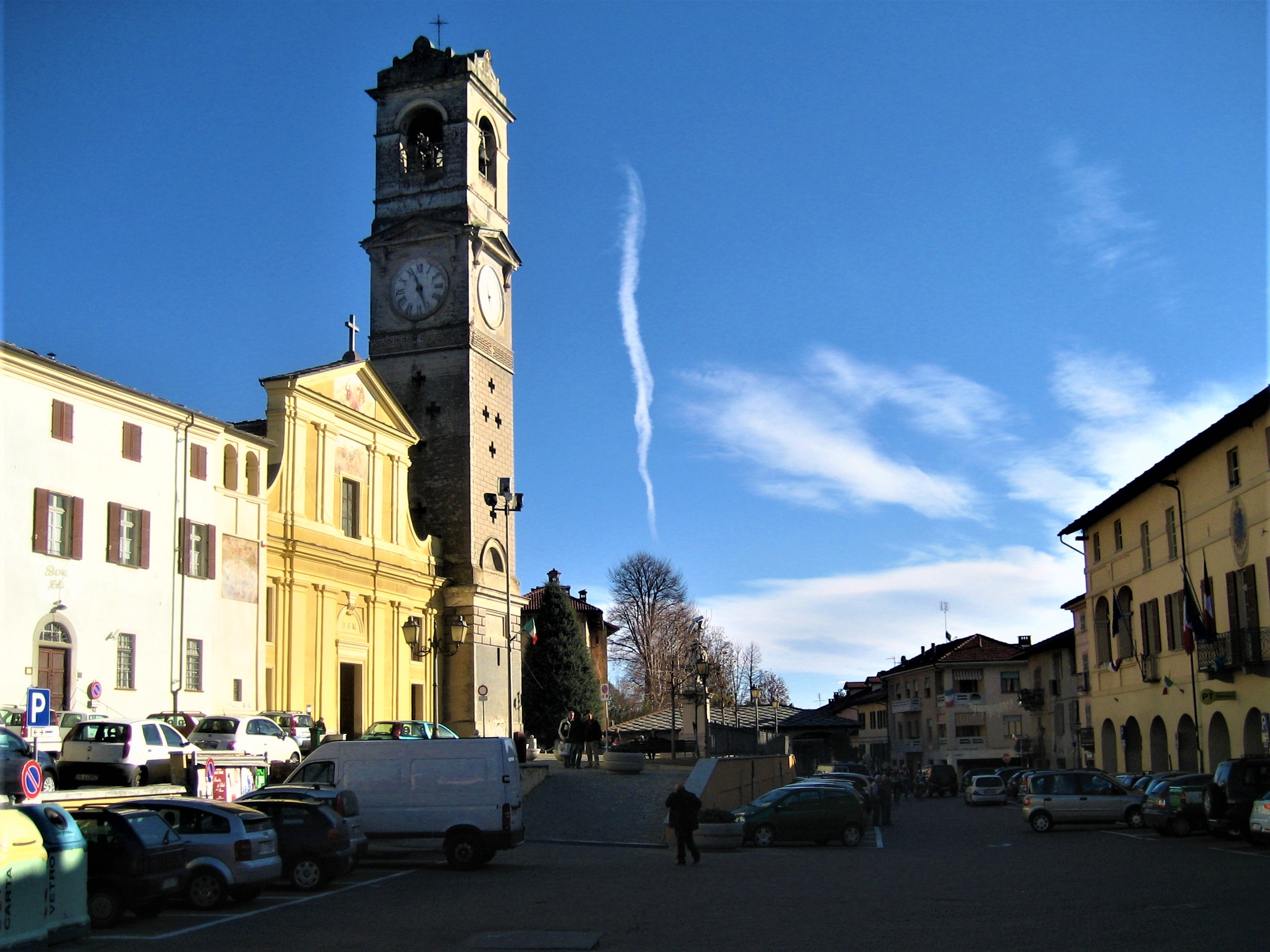 Dorfplatz